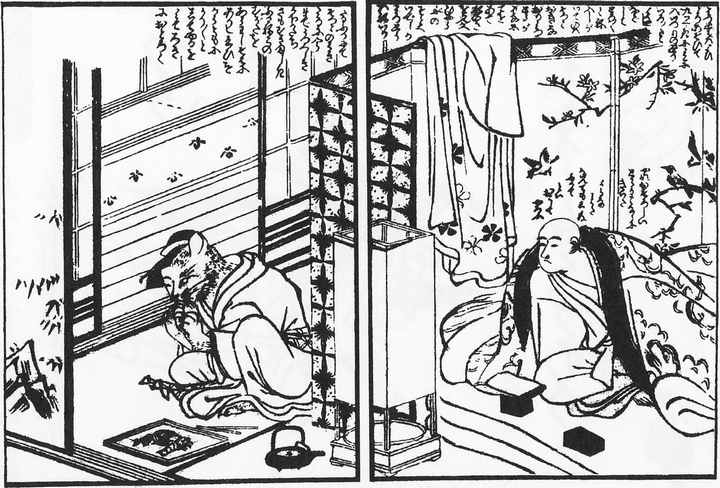 Bakeneko-yūjo (化猫遊女) from the Bakemono-Yotsugi-Hachinoki (化物世櫃鉢木)